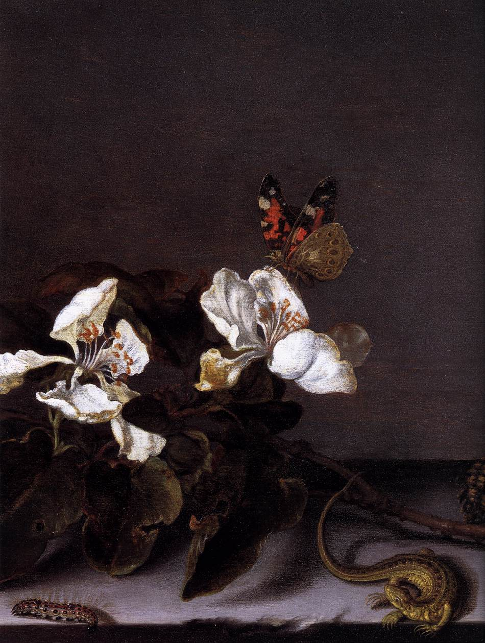 detail